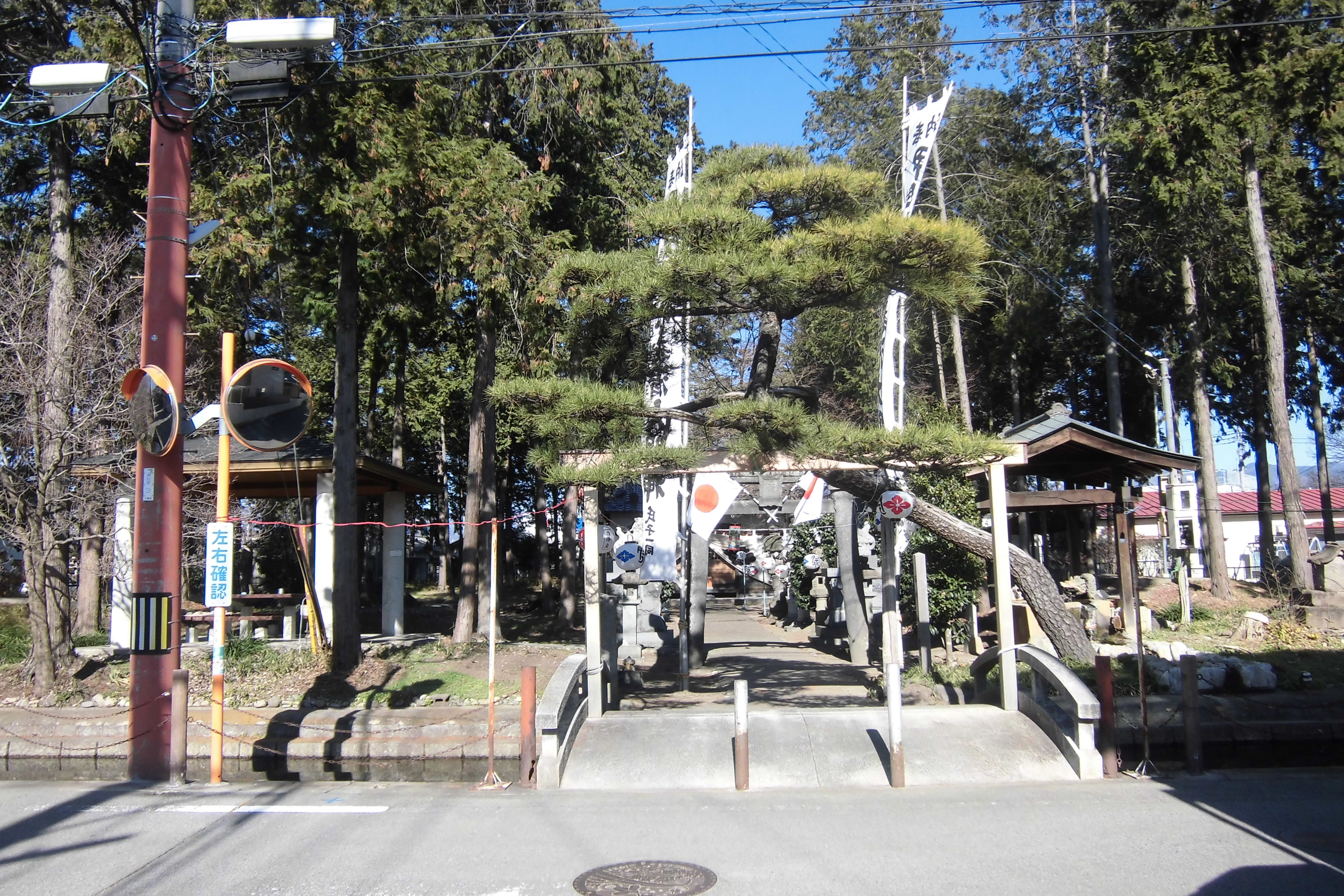 義清神社（山梨県昭和町西条）